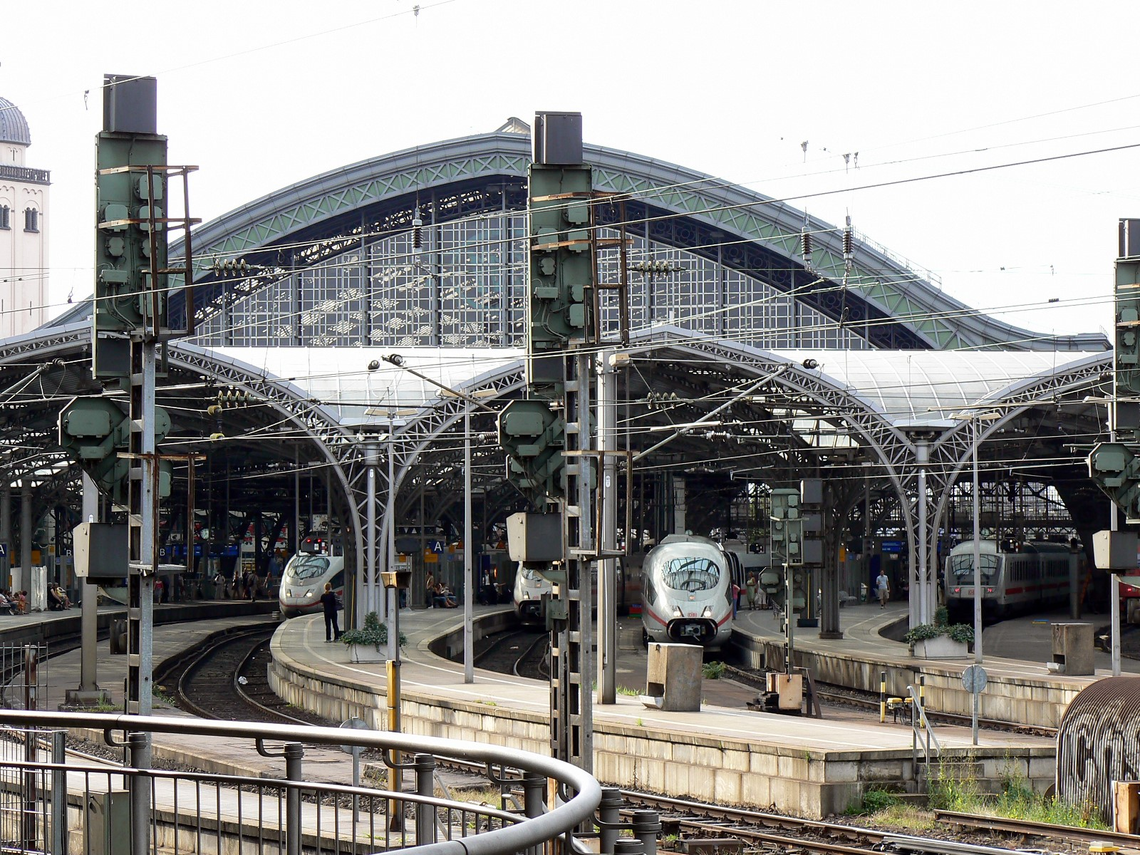 Blick in den Kölner Hauptbahnhof (von Süden).